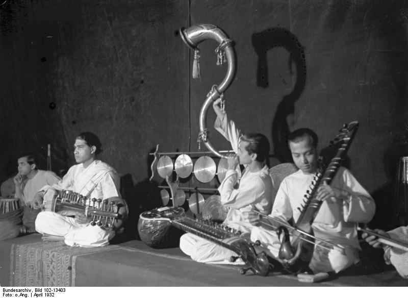 Hindus tanzen und musizieren in Berlin! Eine Gruppe brahmanischer Musikanten mit ihren phantastischen Instrumenten.